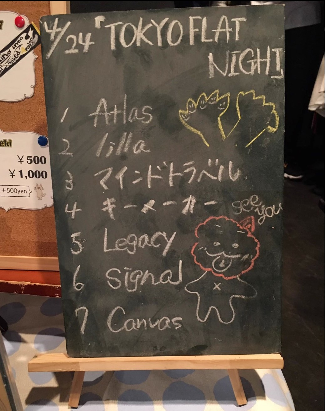 amiinAセトリボード(20170424(1))